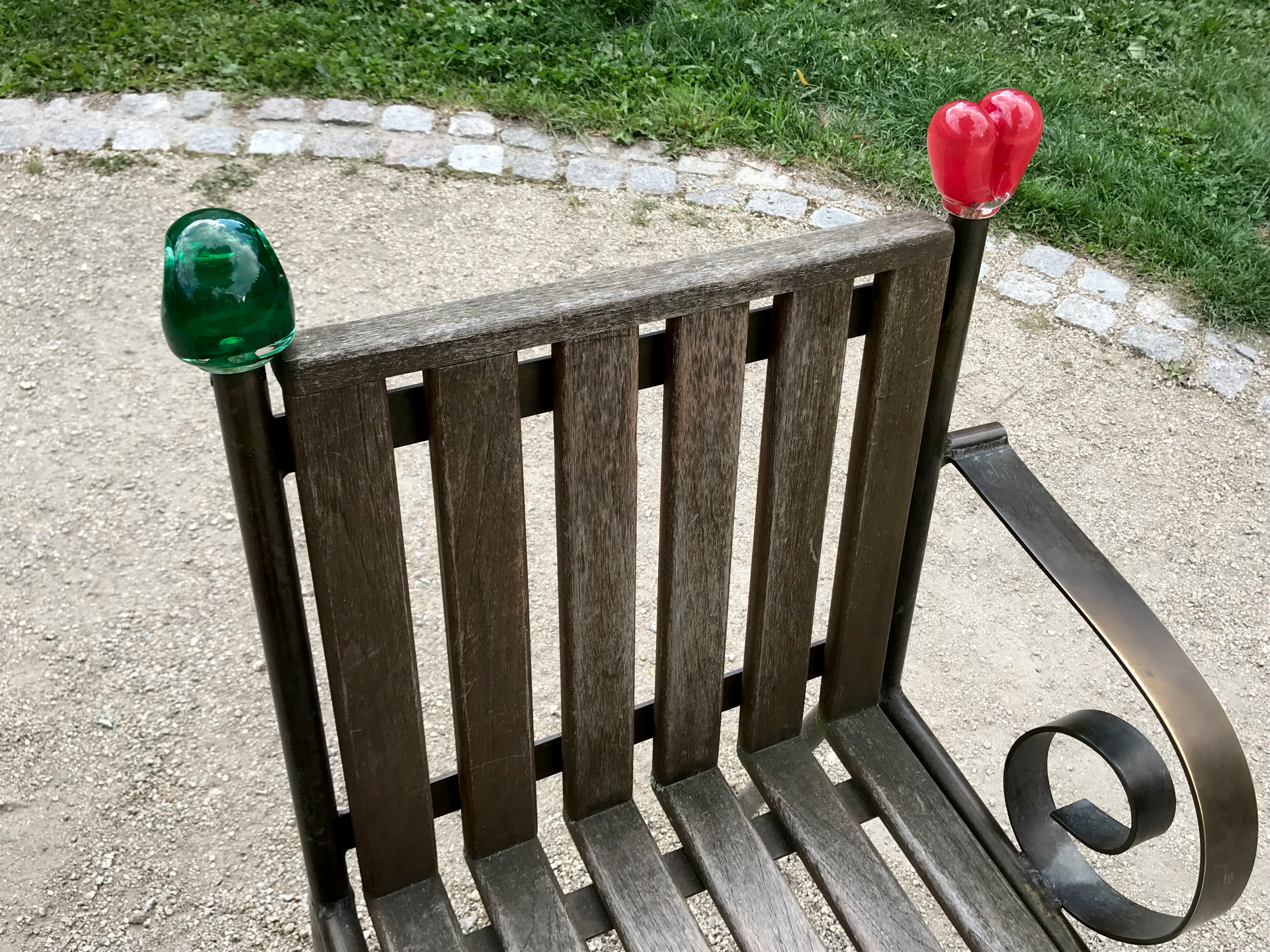 Opěrka křesla lavičky Václava Havla v Karlových Varech v sadech Karla IV.